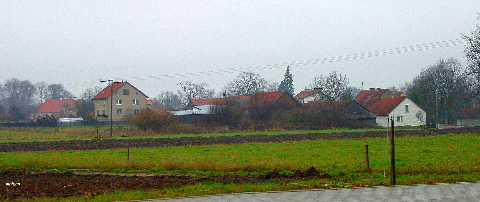 Budry. Panorama wsi od strony południowej